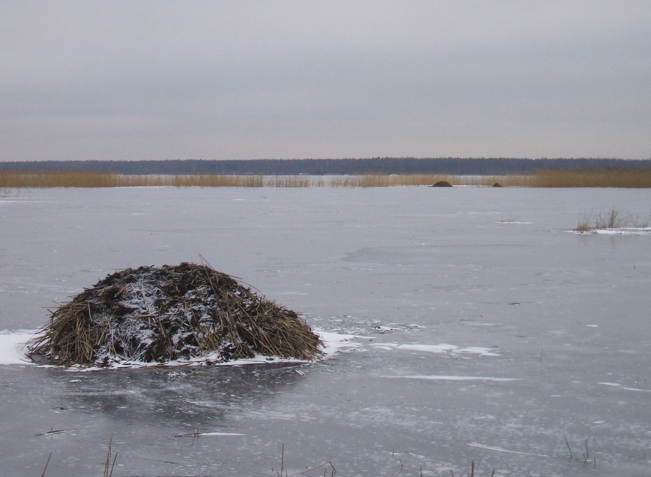 Ондатровые хатки на Сестрорецком Разливе